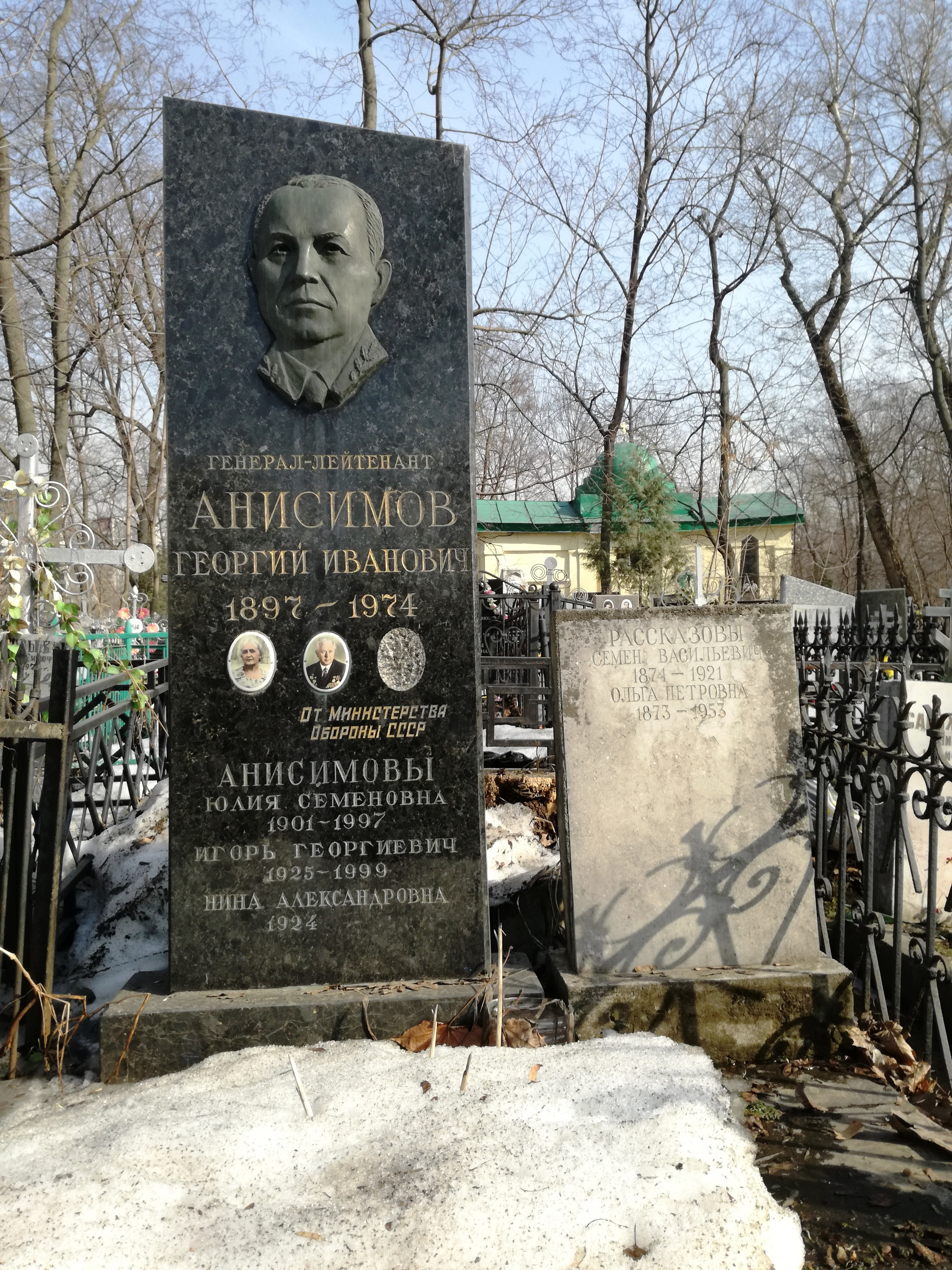 Даниловское кладбище